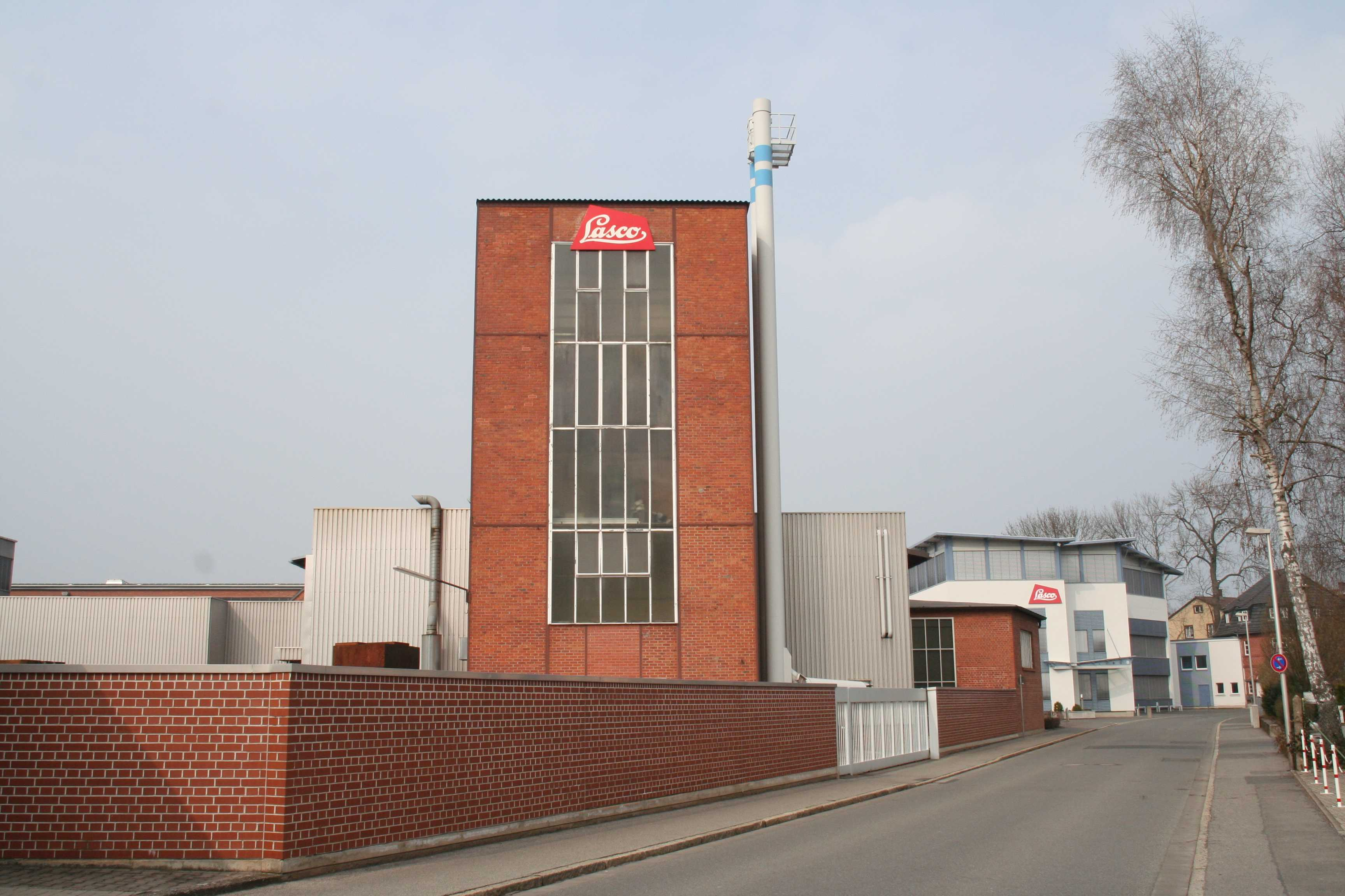 LASCO, Coburg-Cortendorf, Hahnweg 139